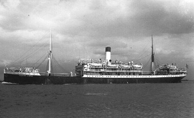 Die frühere GERTRUD WOERMANN, later brasilianische CURVELLO, finally SIQUETRA CAMPOS